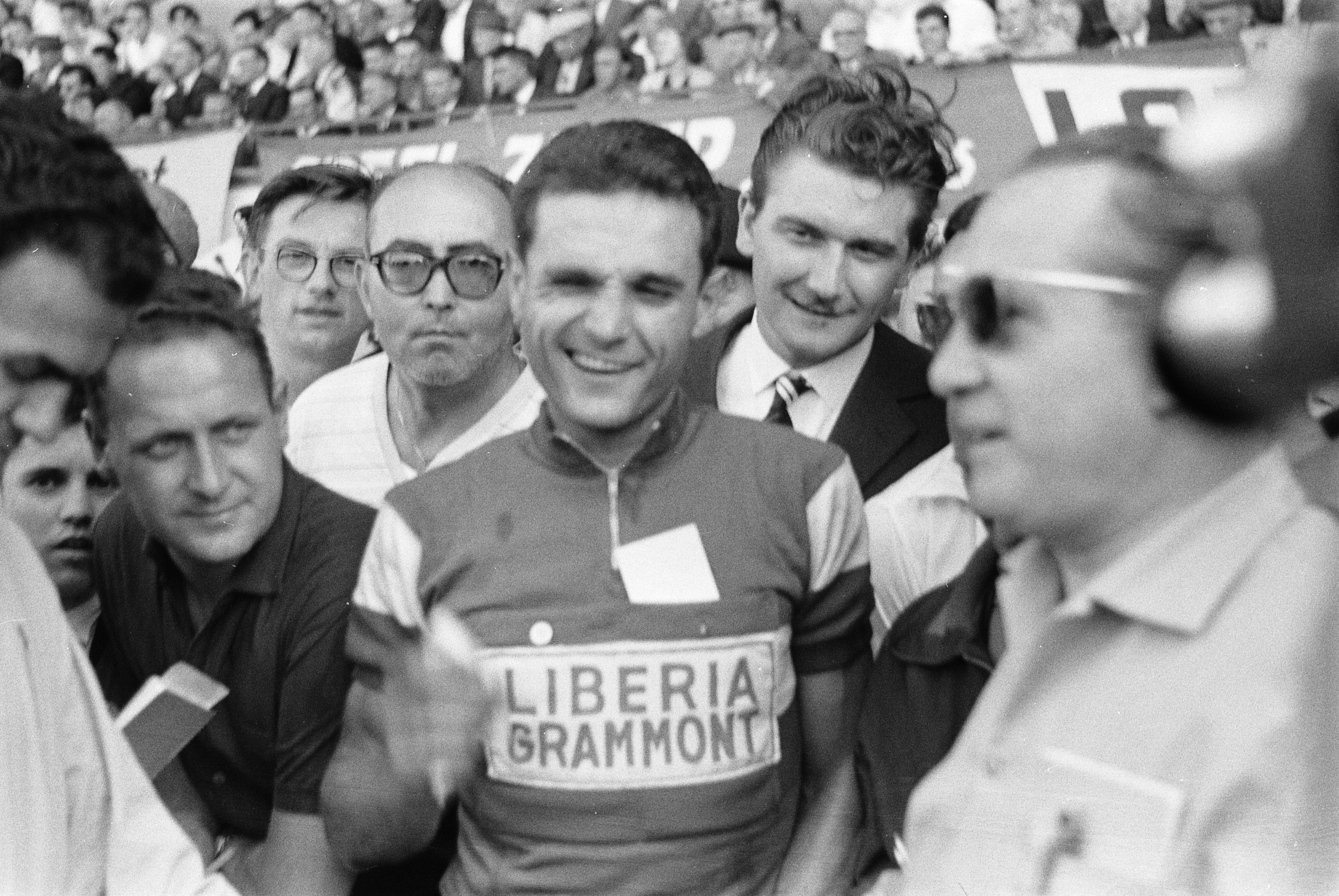 Collectie / Archief : Fotocollectie Anefo Reportage / Serie : Tour de France 1960 Beschrijving : Tour de France, Henri Anglade Datum : 7 juli 1960 Locatie : Frankrijk Trefwoorden : sport, wielrennen Persoonsnaam : Anglade, Henri Instellingsnaam : Tour de France Fotograaf : Harry Pot / Anefo, [onbekend] Auteursrechthebbende : Nationaal Archief Materiaalsoort : Negatief (zwart/wit) Nummer archiefinventaris : bekijk toegang 2.24.01.05 Bestanddeelnummer : 911-3774